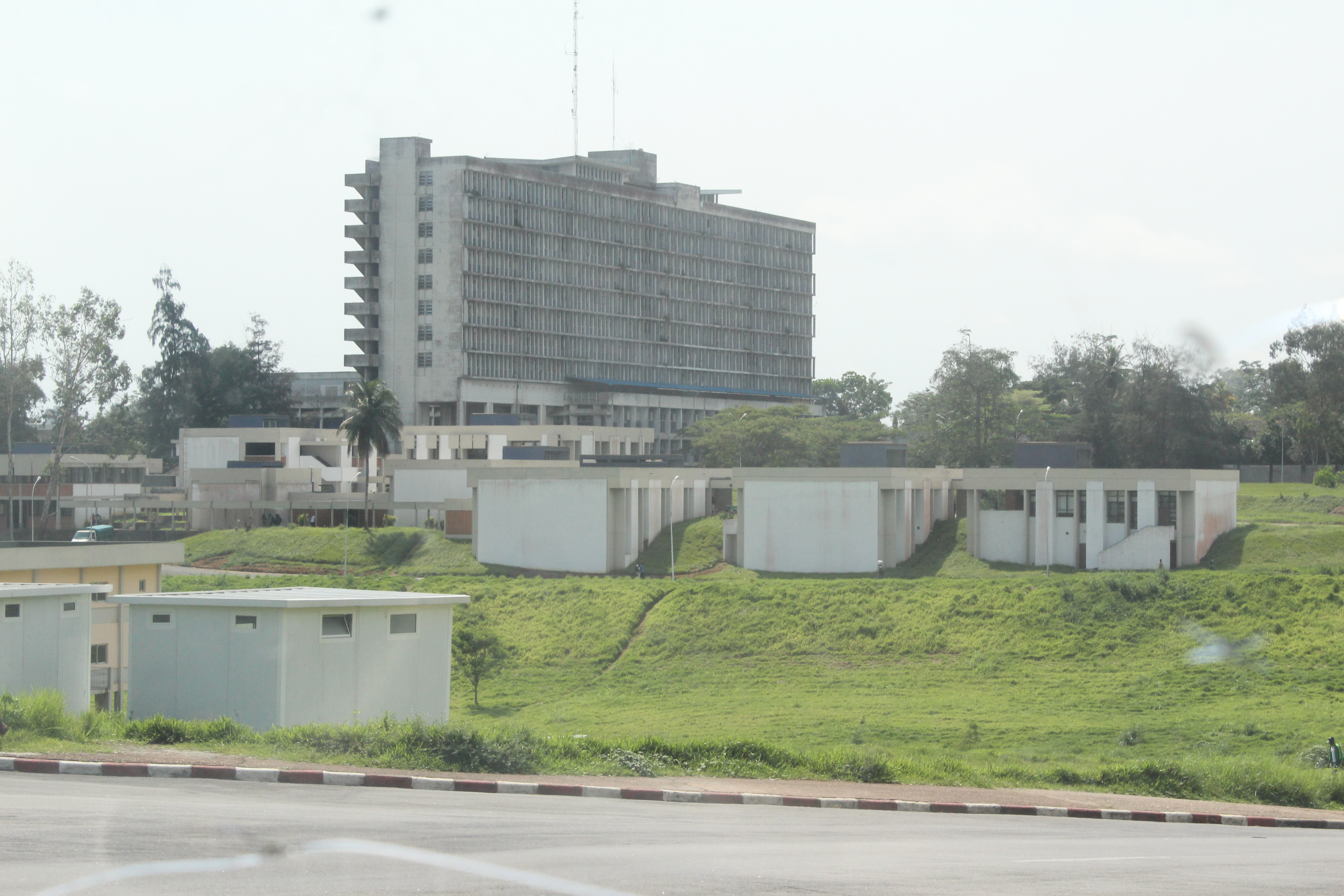 Centre Hospitaler Universitaire de Cocody vu de l'Université Félix Houphouët-Boigny